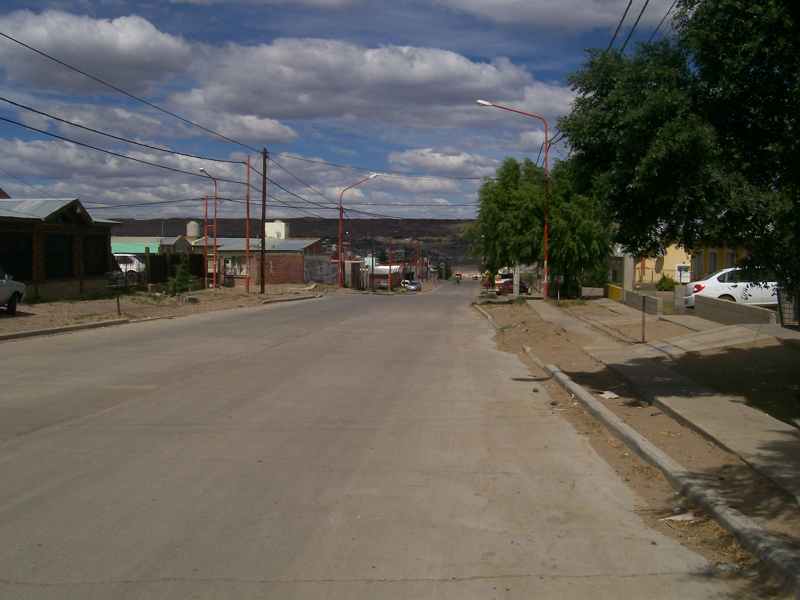 Avda. Emilio Arce en el Rotary 23